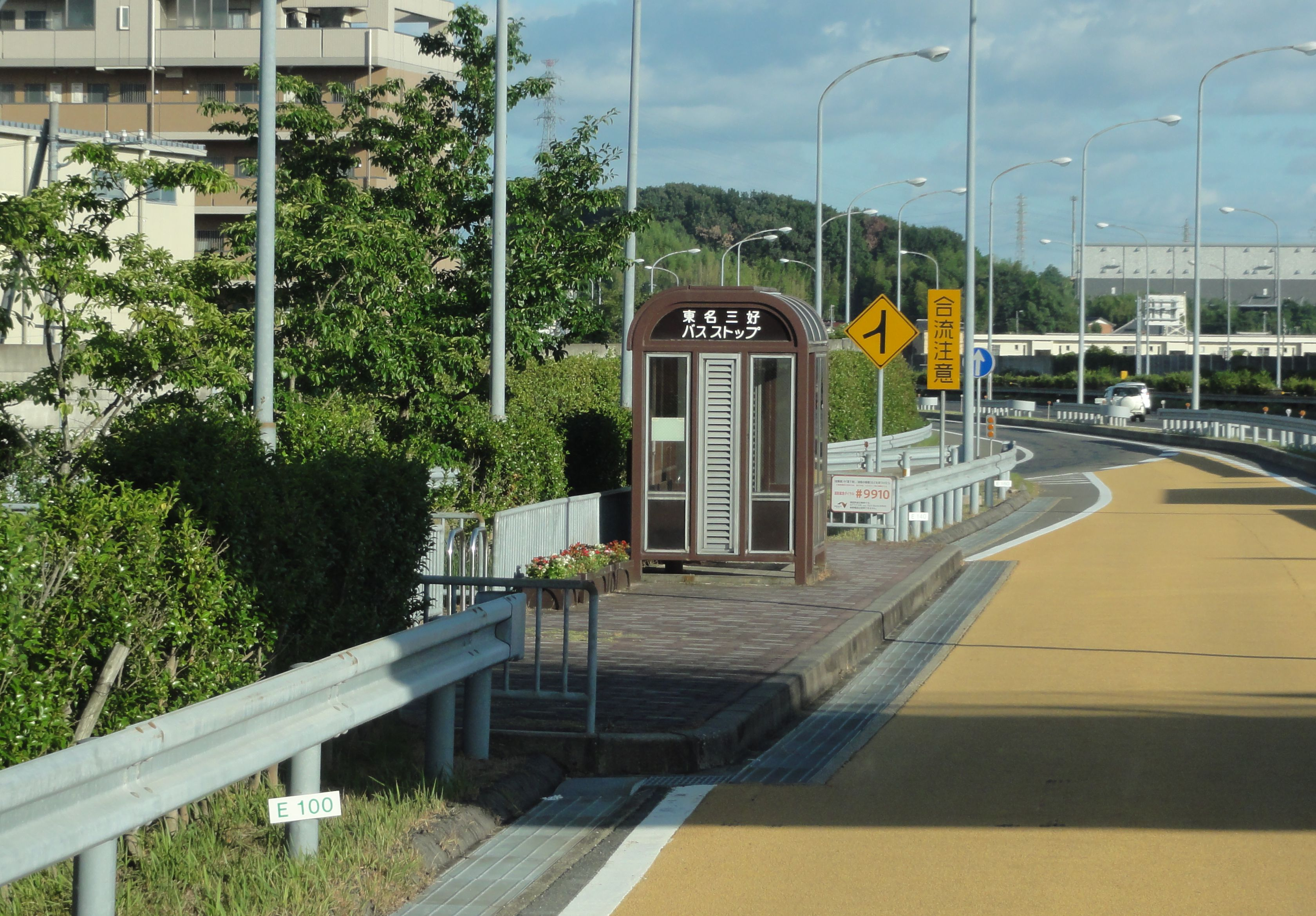 東名三好バスストップ上り線施設